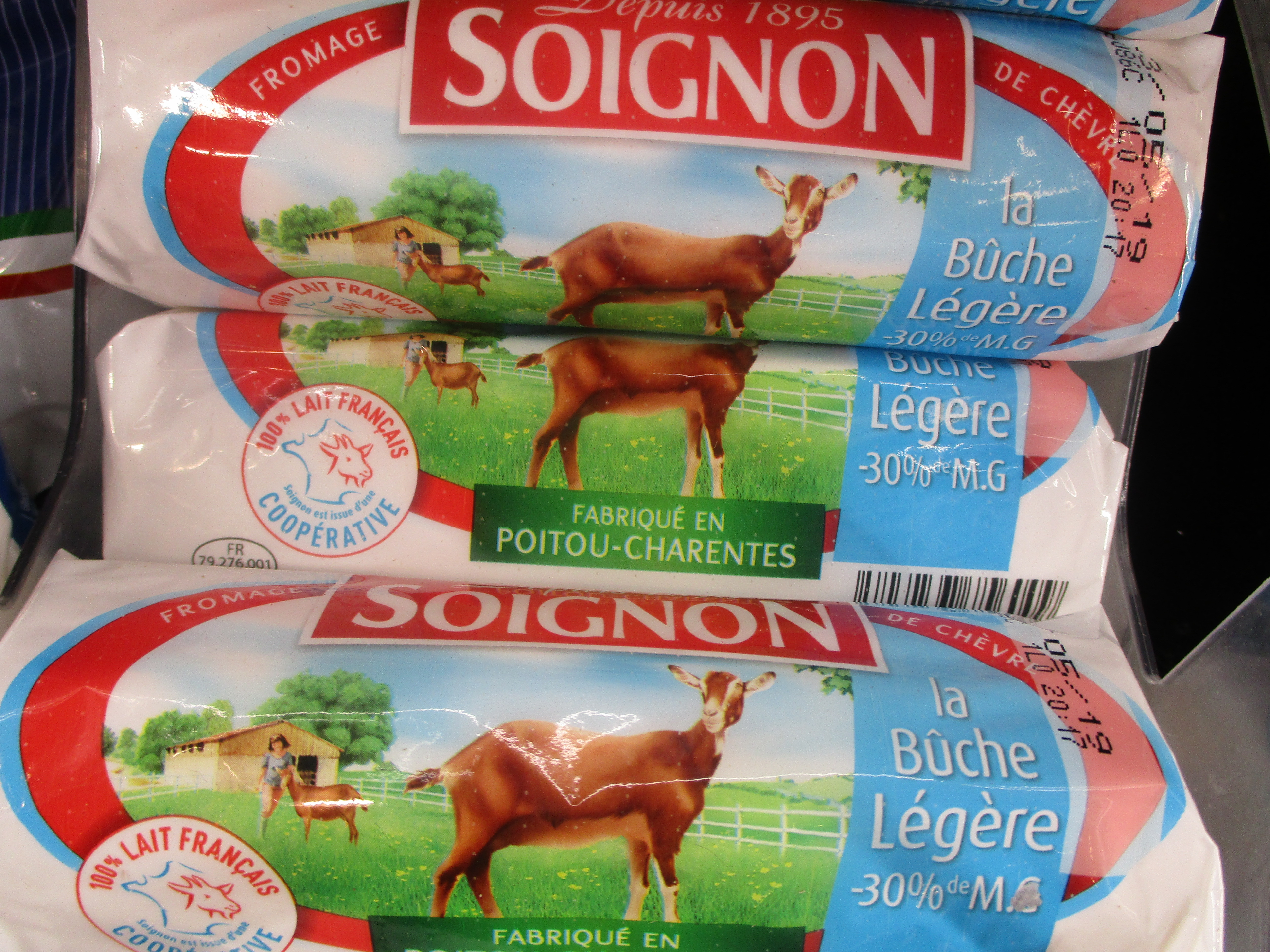 Soignon, bûche de fromage de chèvre.